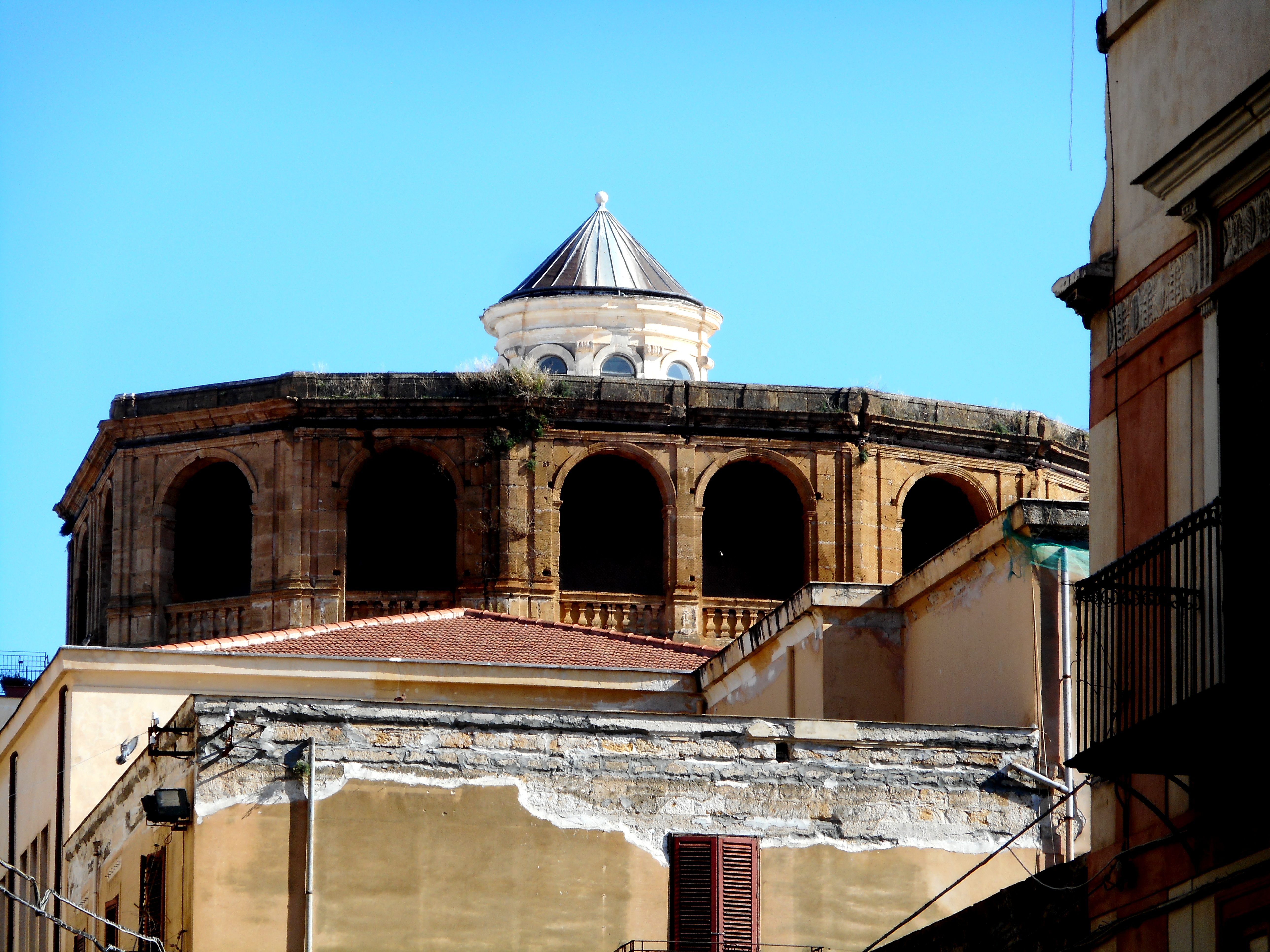 Cupola e Loggiato del Santissimo Salvatore.